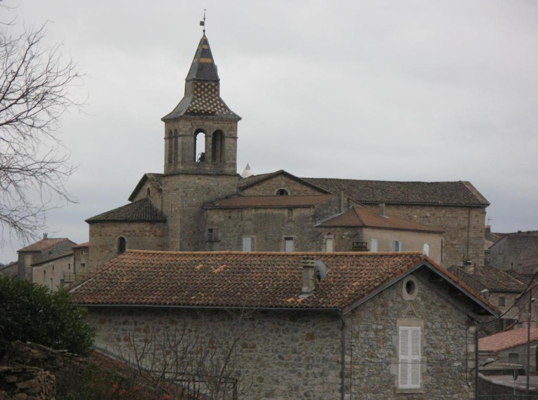 village de Laurac en Vivarais (Ardèche)